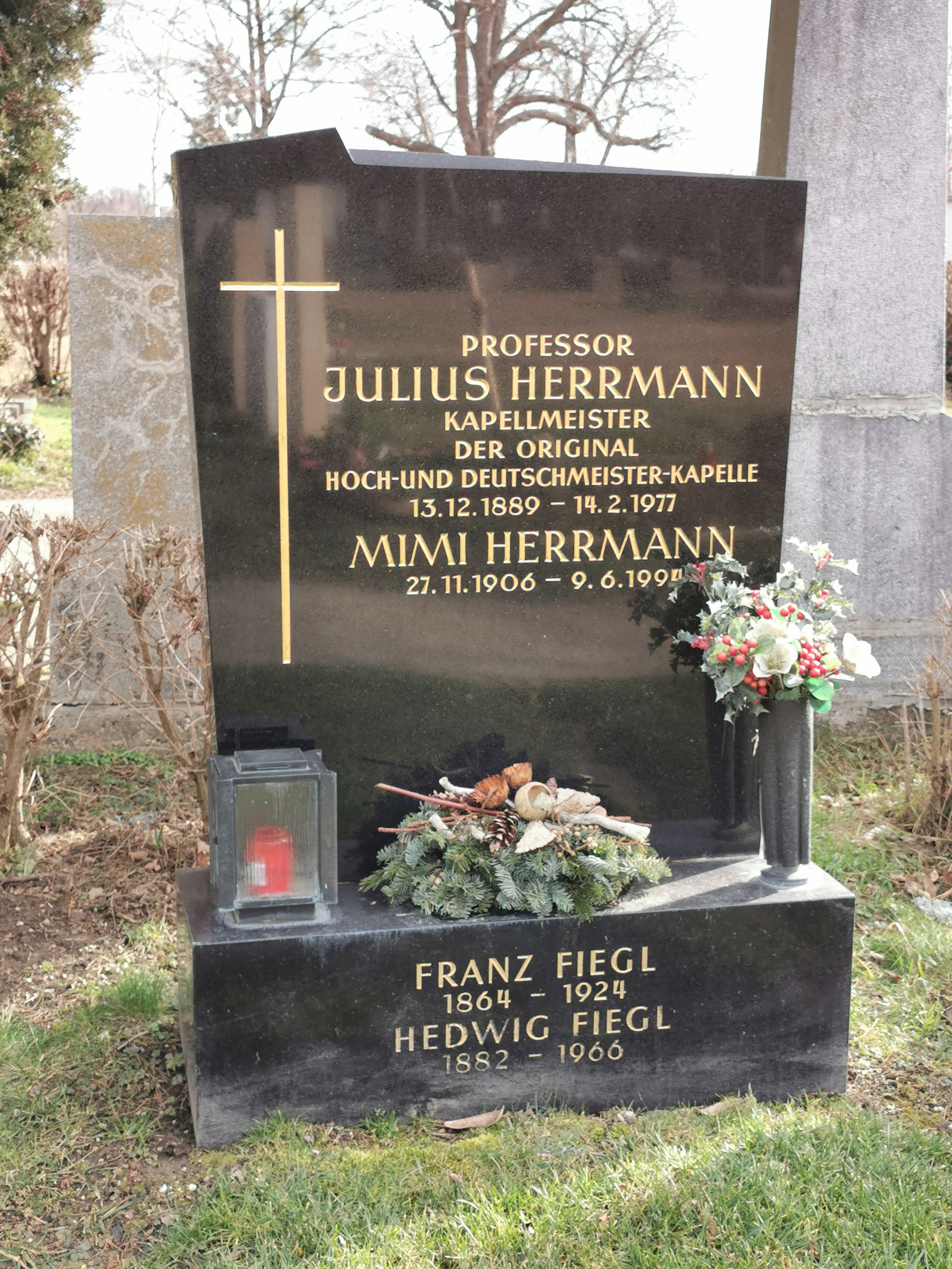 Grab von Prof. Julius Herrmann auf dem Zentralfriedhof Wien